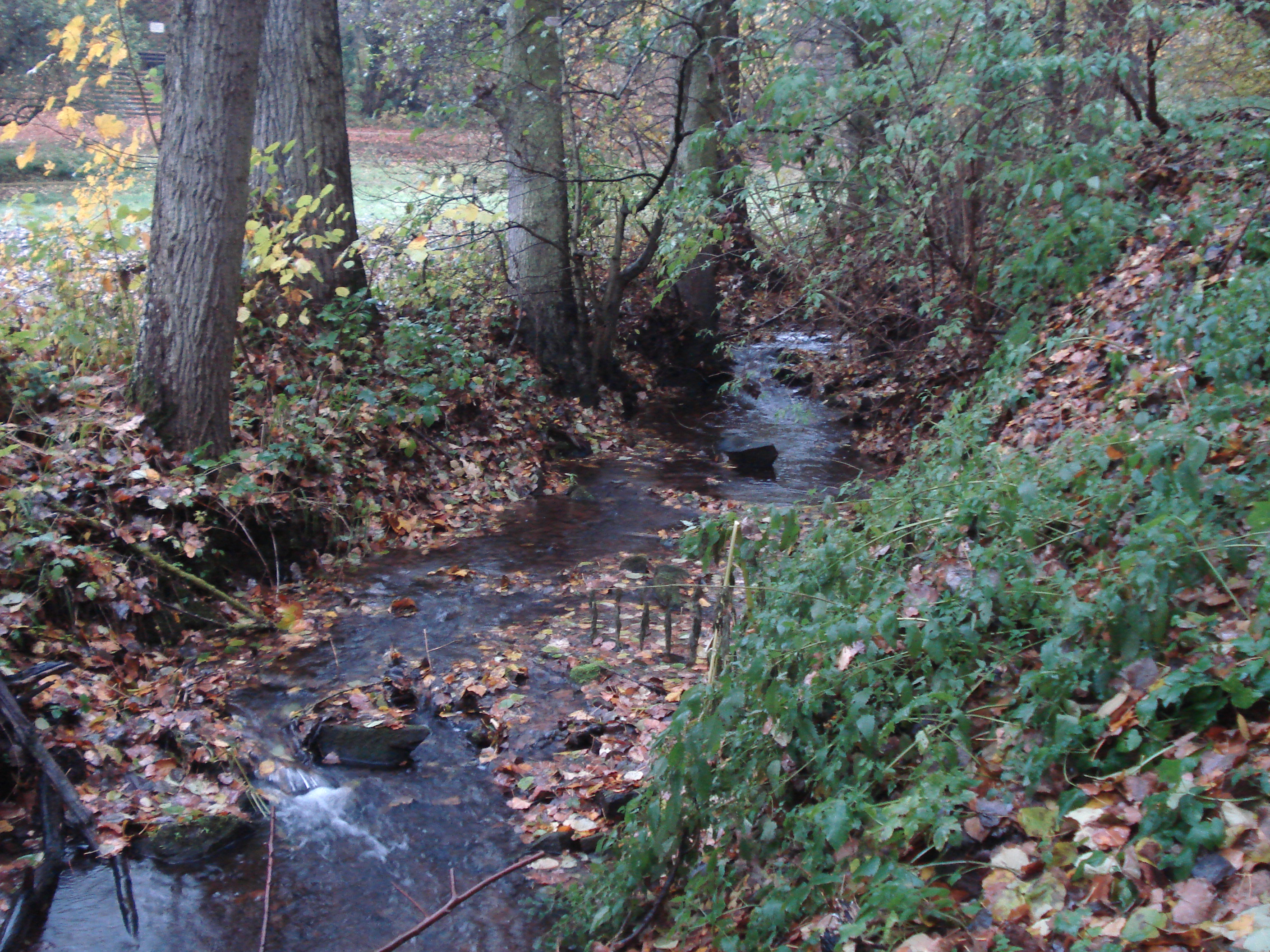 Der Kohlbach nördlich von Eichenbühl